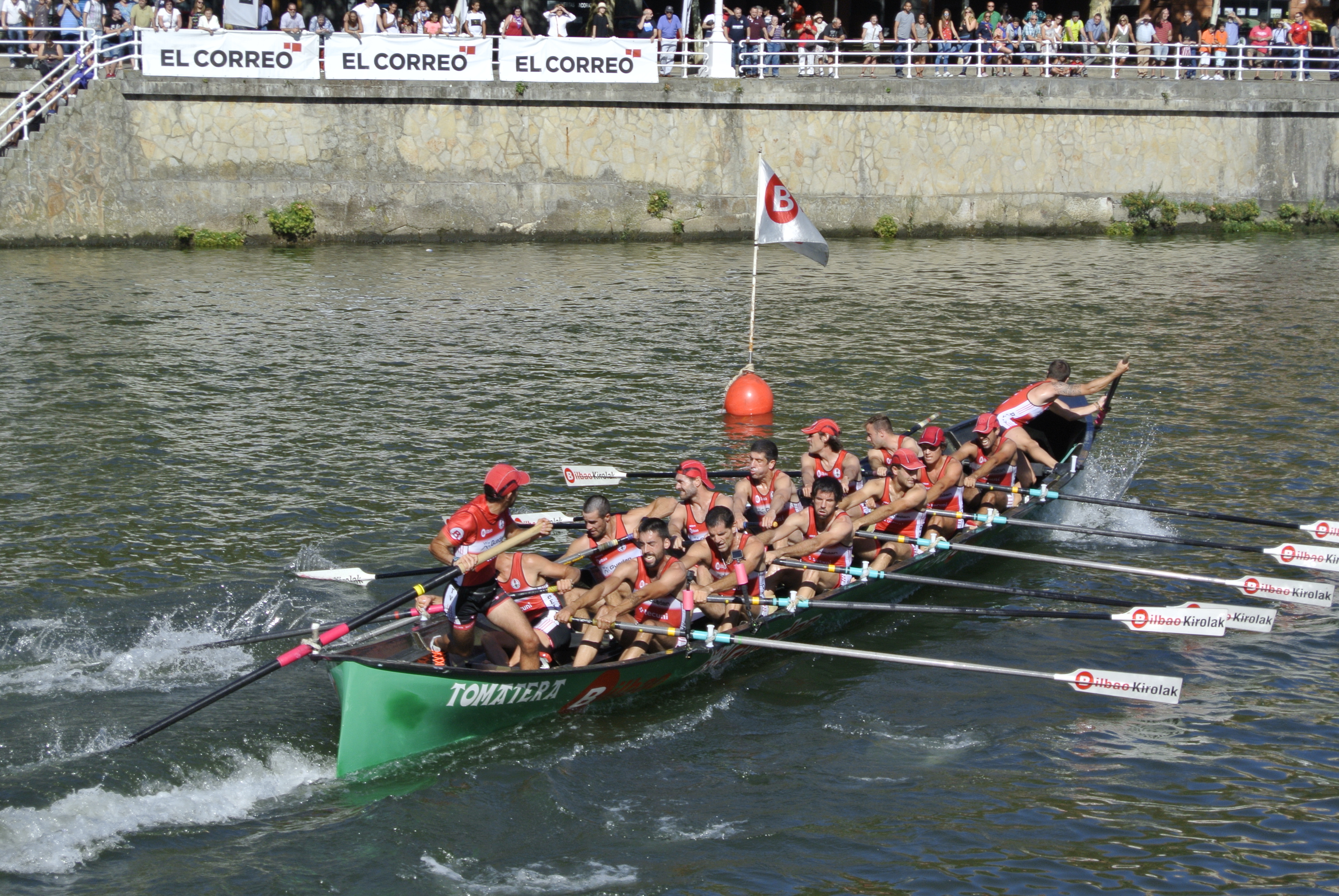 Trainera de Deustu Arraun Taldea en la última jornada de la liga ARC-1